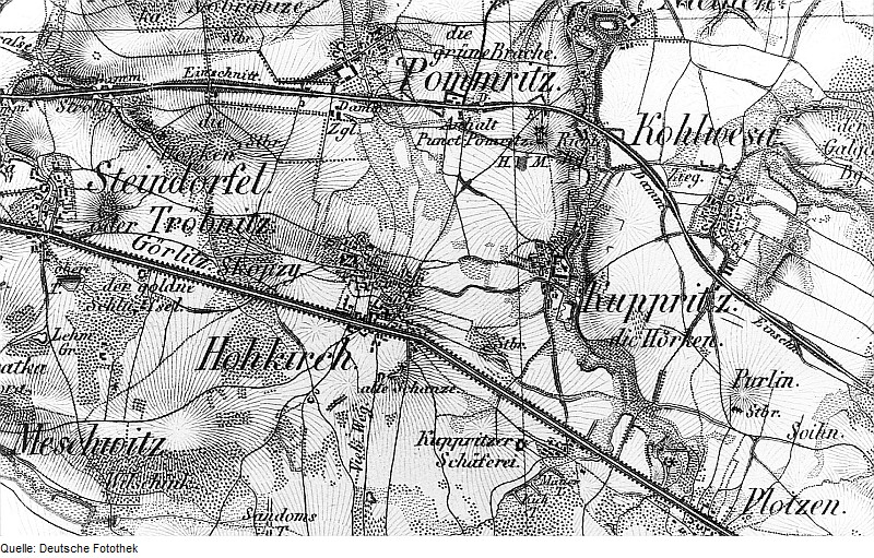 Original image description from the Deutsche Fotothek Hochkirch-Plotzen. Oberreit, Sect. Bautzen, 1844/46